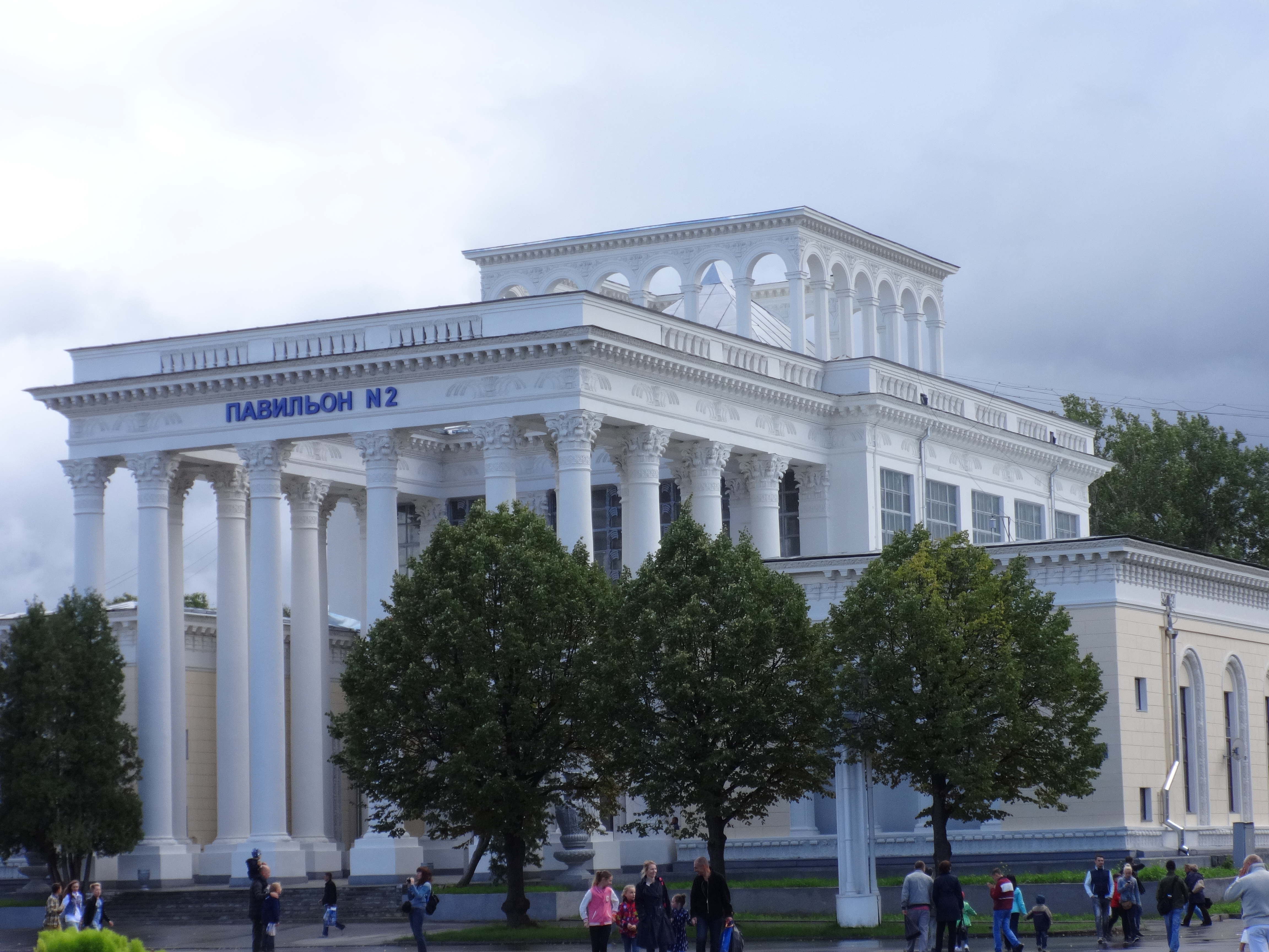 Павильон «Народное образование» (бывший Северного Кавказа) (Москва и Московская область, Москва, Мира проспект, 115)